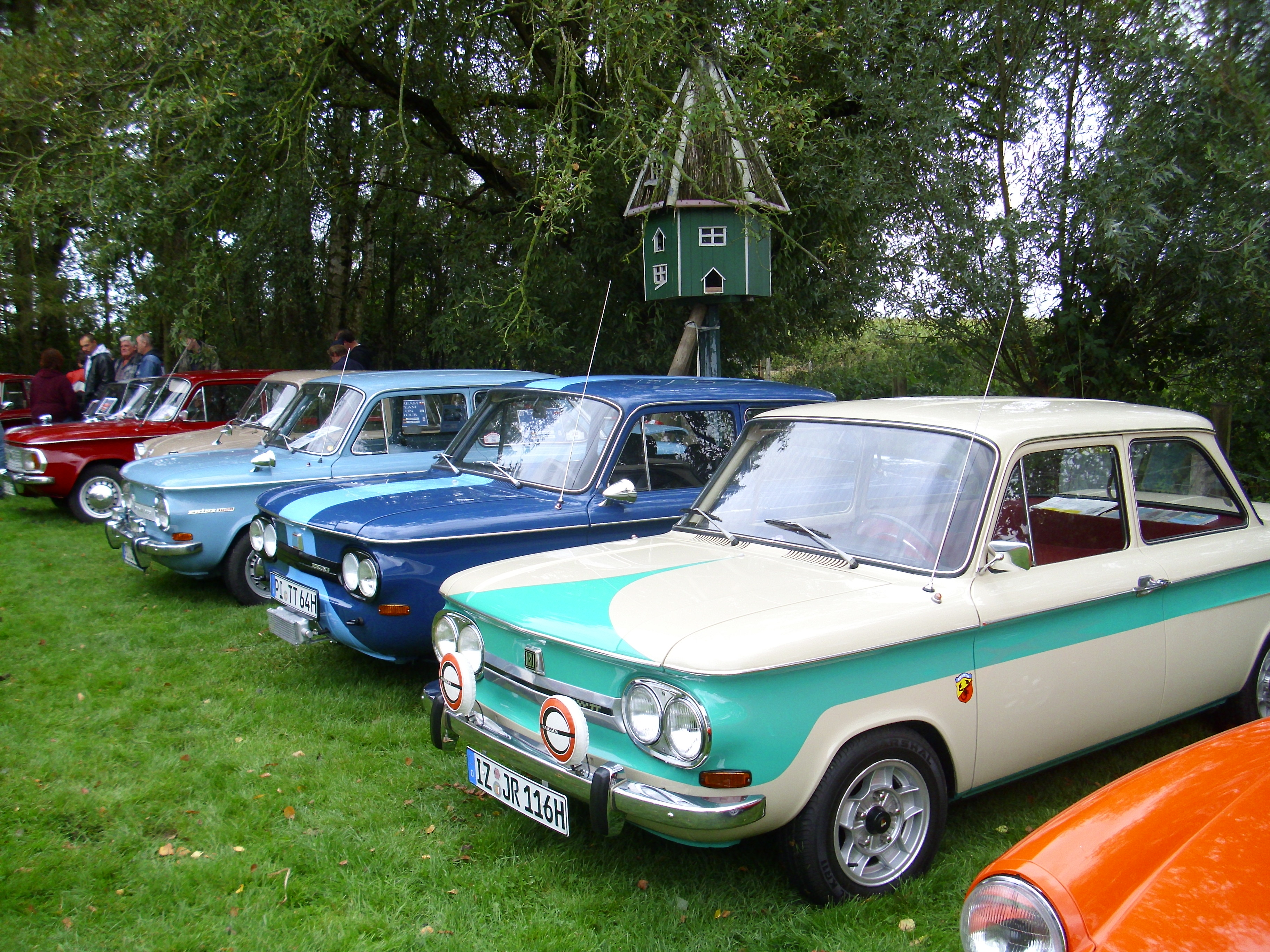 Fünf NSU Prinz beim Oldtimertreffen auf dem Gelände des Speichenmuseum in Klein Offenseth-Sparrieshoop